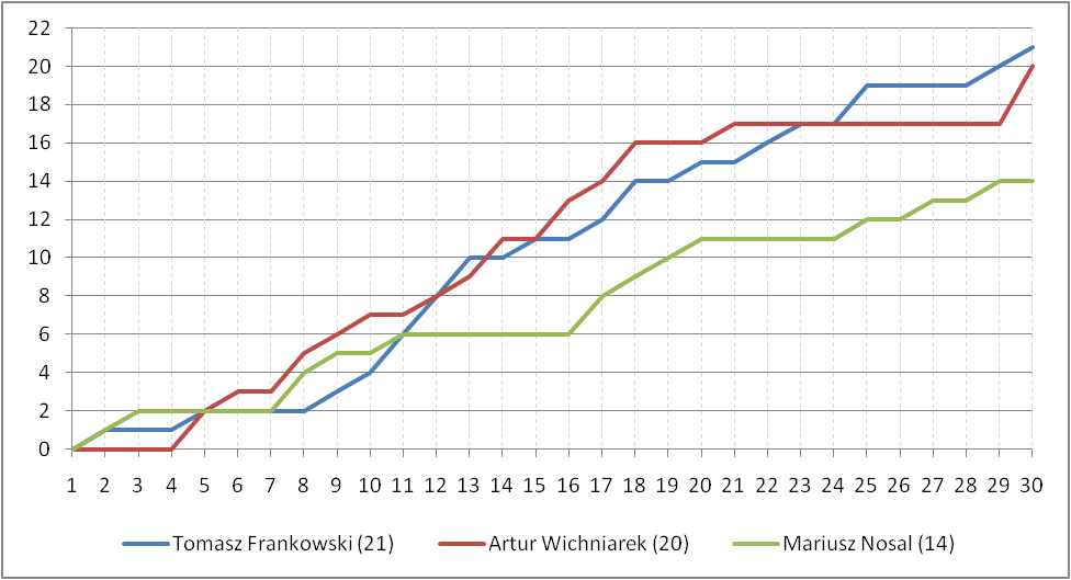 Wykres przedstawiający przebieg rywalizacji o tytuł Króla Strzelców w poszczególnych kolejkach sezonu piłkarskiej Ekstraklasy w sezonie 1998/1999